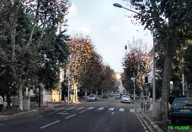 Le boulevard Carabacel, vue en direction d'Acropolis (Est).